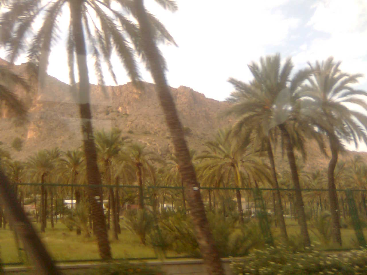 Foto del Palmeral de San Antón, Orihuela